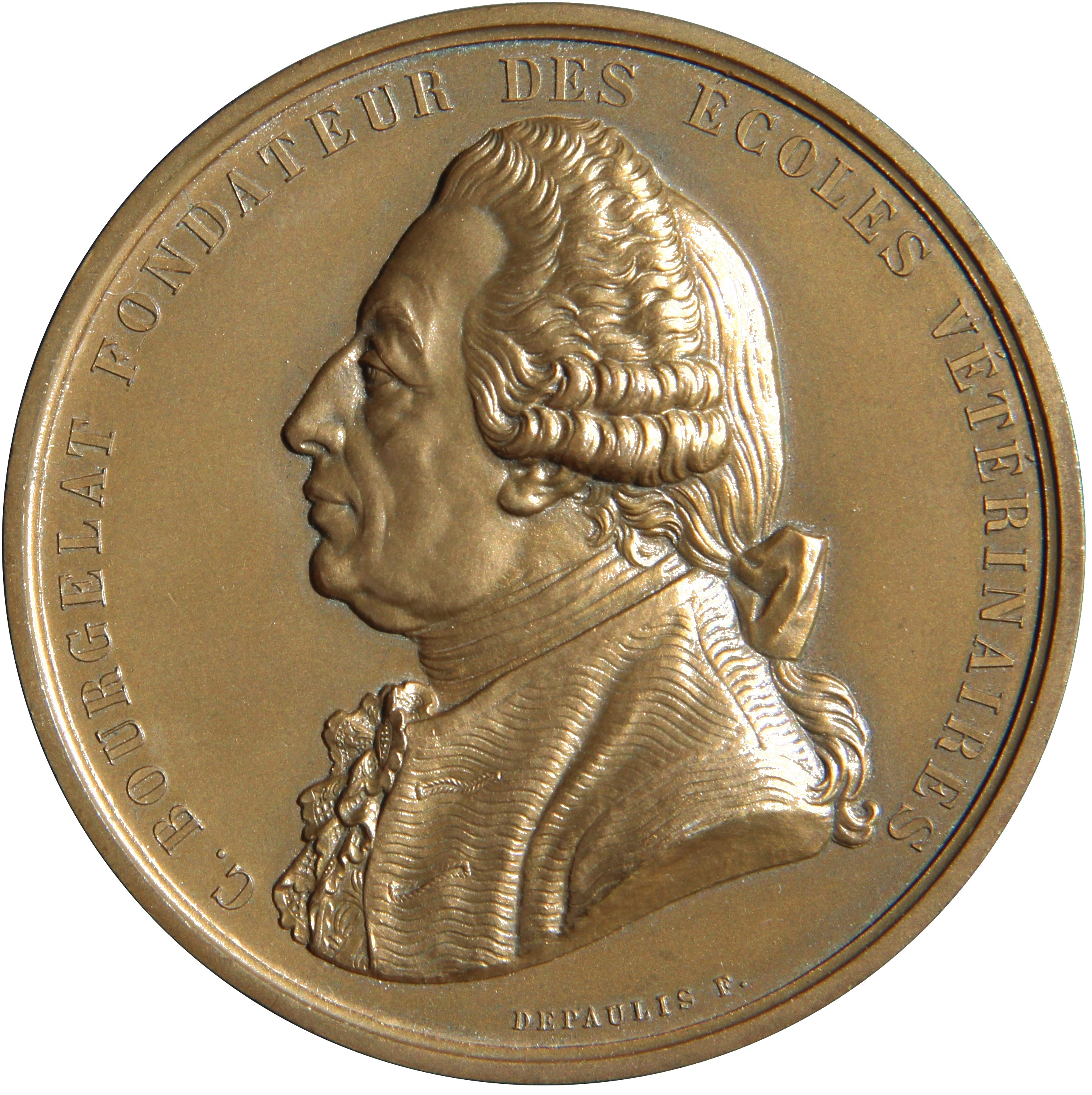 Avers de la médaille à l'effigie de Claude Bourgelat (11 novembre 1712 - 3 janvier 1779), fondateur des Écoles vétérinaires françaises ; par Alexis-Joseph Depaulis (30 août 1790 - 29 septembre 1867), sculpteur et médailleur français